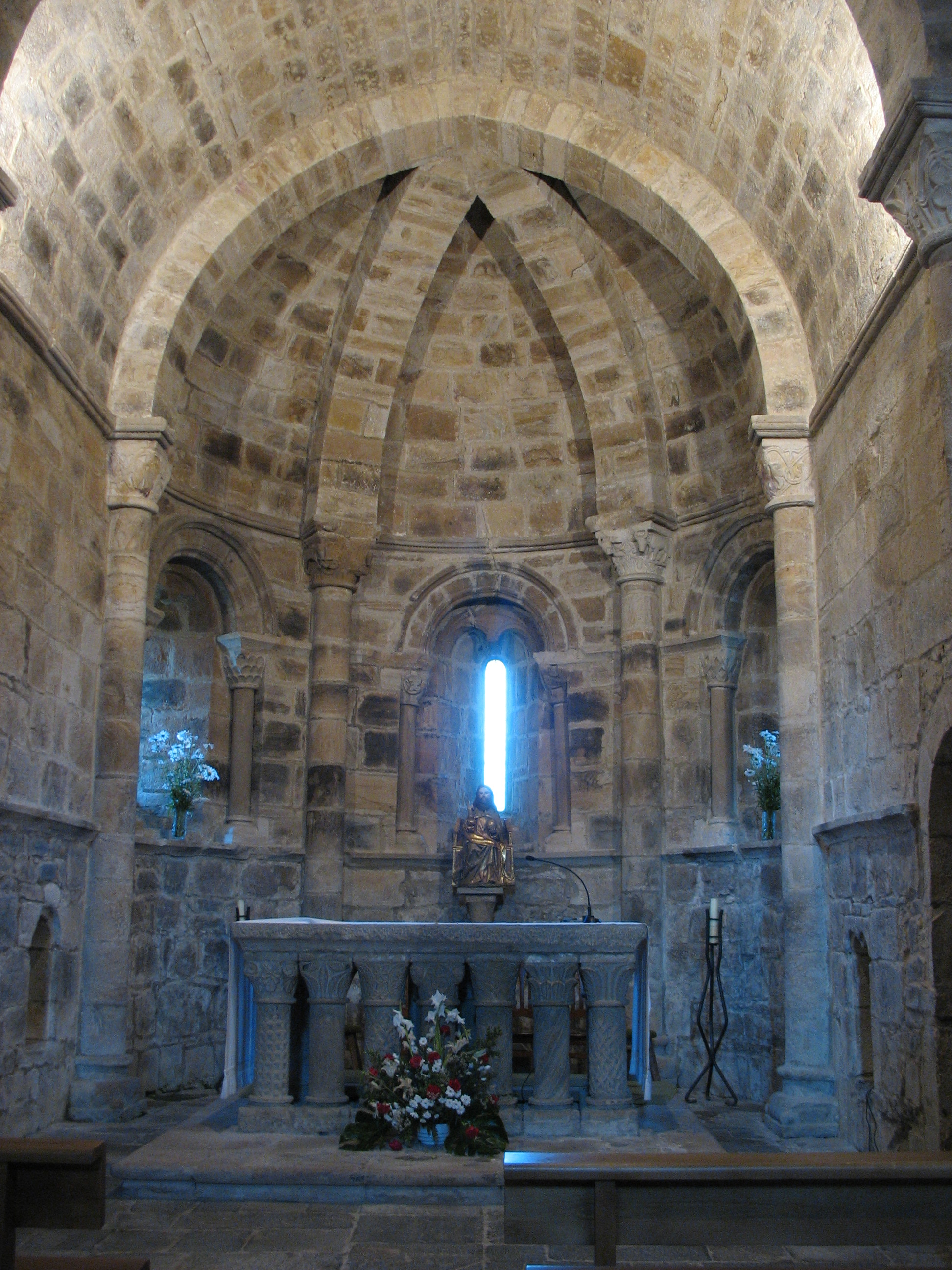 Iglesia Parroquial de San Salvador de Cantamuda. Vista interior del altar y el ábside central.